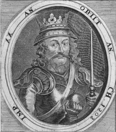 Knud 4. Valdemarsen gjorde Danmark til en af Østersøens stormagter.